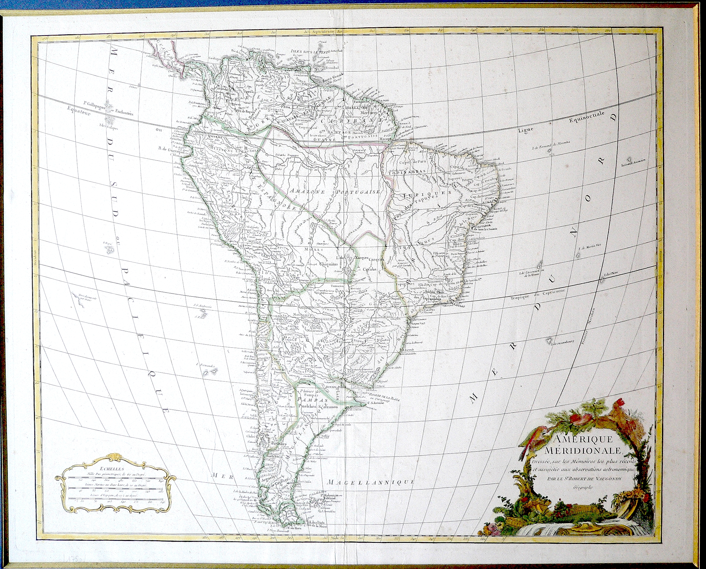 Reprint of Amérique Méridionale, dressee, sur les Memoires les plus recents et assujetie aux observations astronomique. Par le Sr. Robert de Vaugondy fils de Mr. Robert Geographe ordin. du Roy. Avec Privilege. 1750. Atlas Universel, Par M. Robert Geographe ordinaire du Roy, et Par M. Robert De Vaugondy son fils Geographe ord. du Roy, et de S. M. Polonoise, Duc de Lorraine et de Bar, et Associe de L'Academie Royale des Sciences et belles Lettres de Nancy, Avec Privilege Du Roy, 1757. A Paris, Chez Les Auteurs ,Quay de l'Horloge du Palais, Boudet Libraire Imprimeur du Roi, rue St. Jacques.